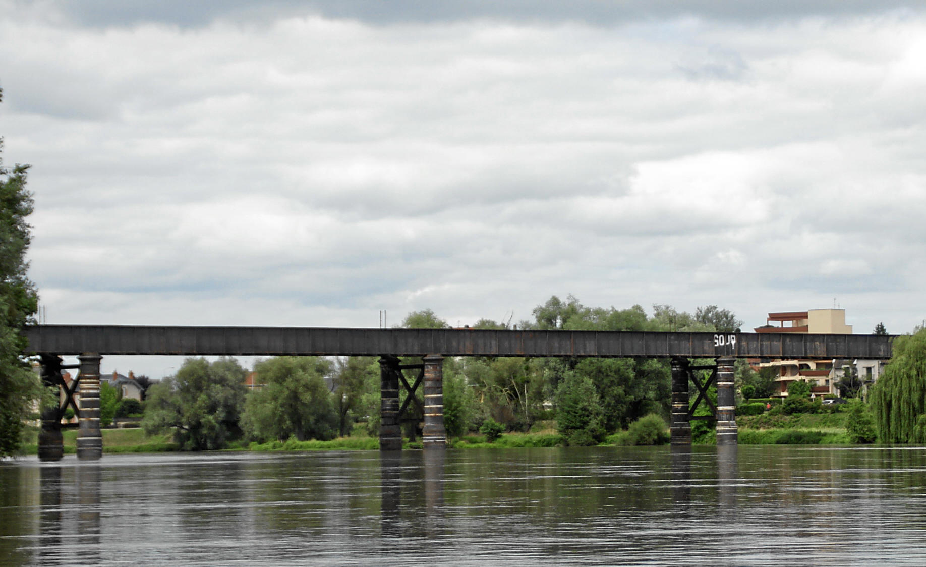 Eisenbahnbrücke über den Allier vor Moulins